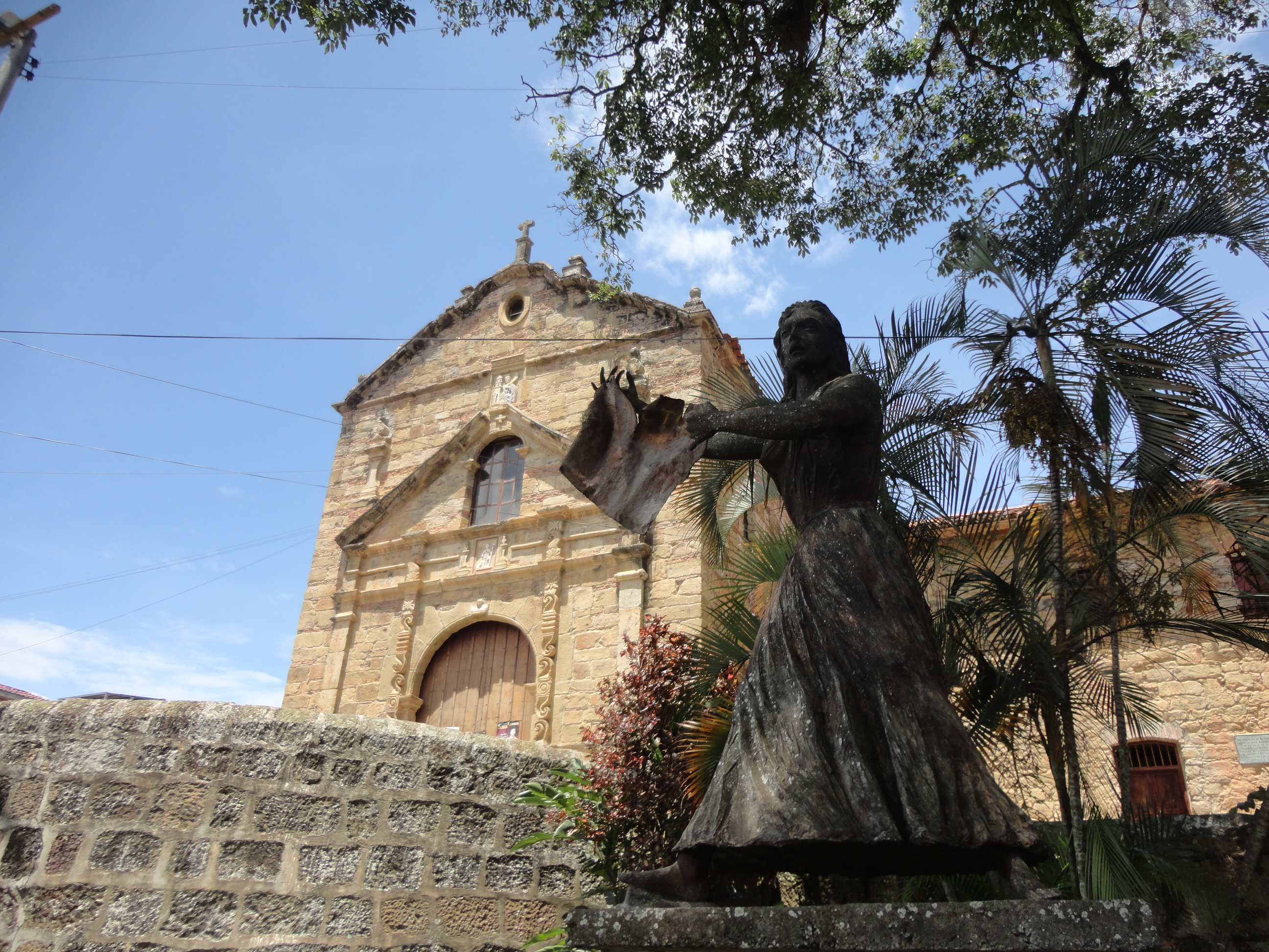 Ubicación: SOCORRO, SANTANDER